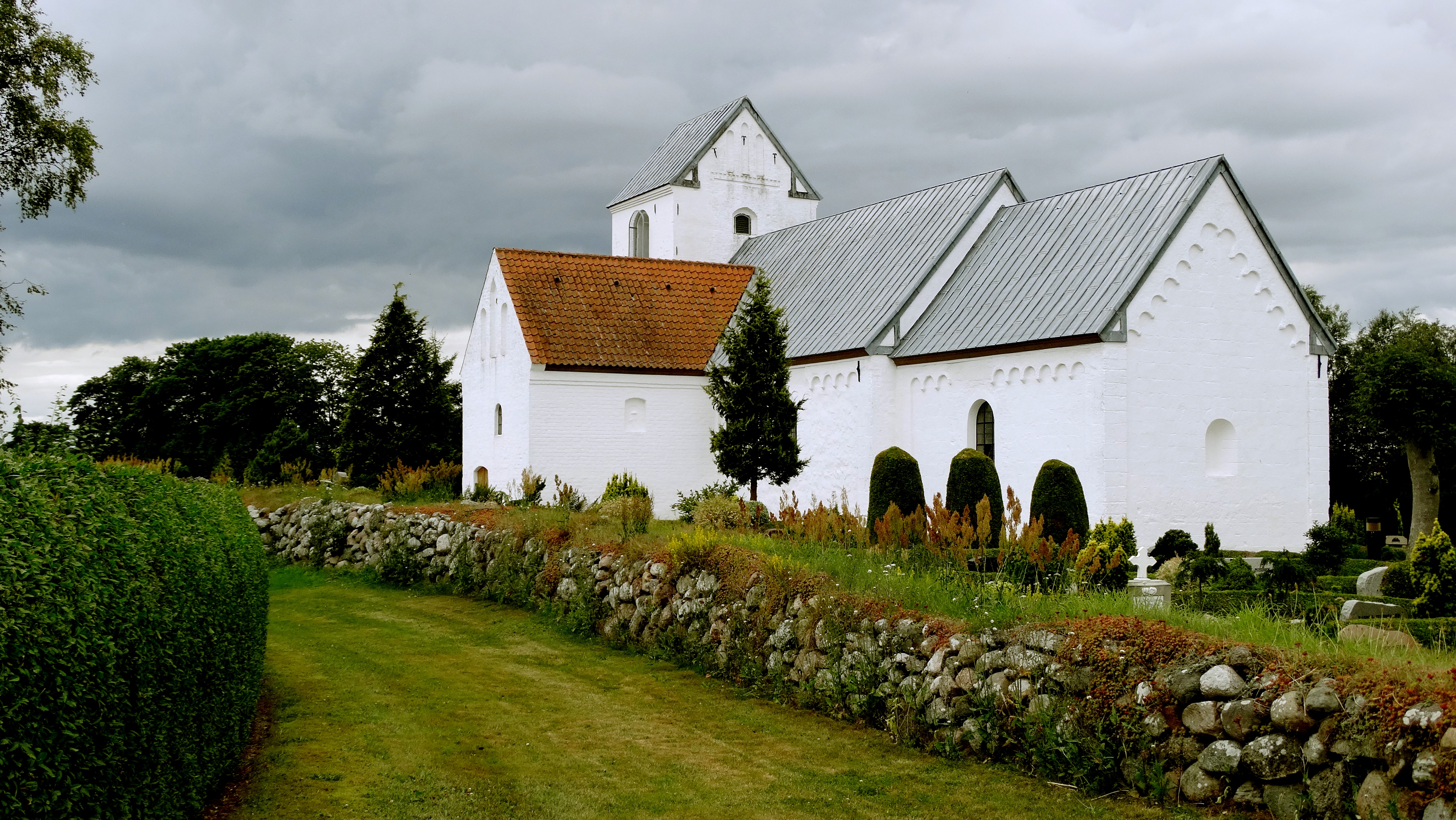 Råsted Kirke nordvest for Randers